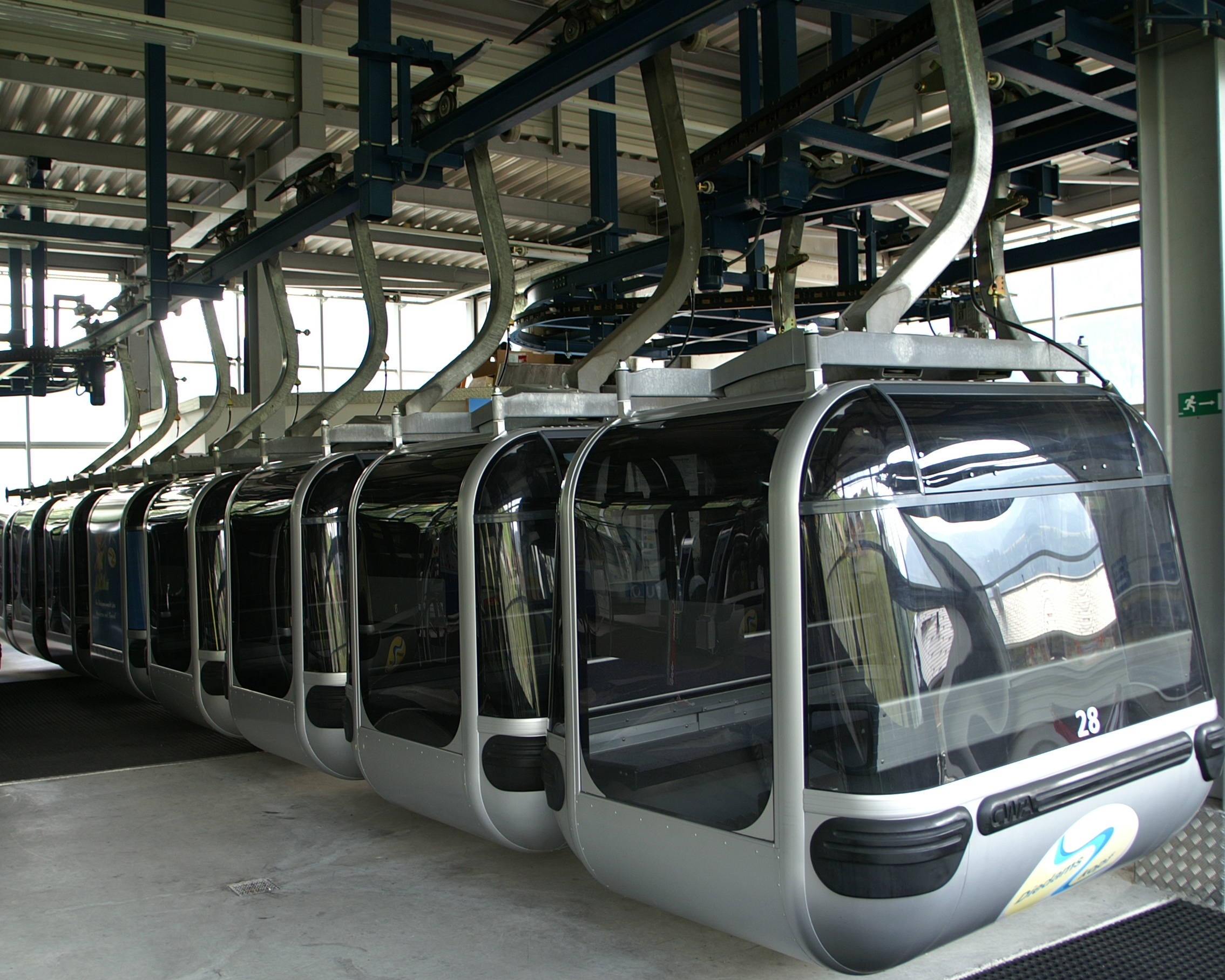 Gondelgarage der Bergbahnen Diedamskopf in Schoppernau im Bregenzerwald , Vorarlberg